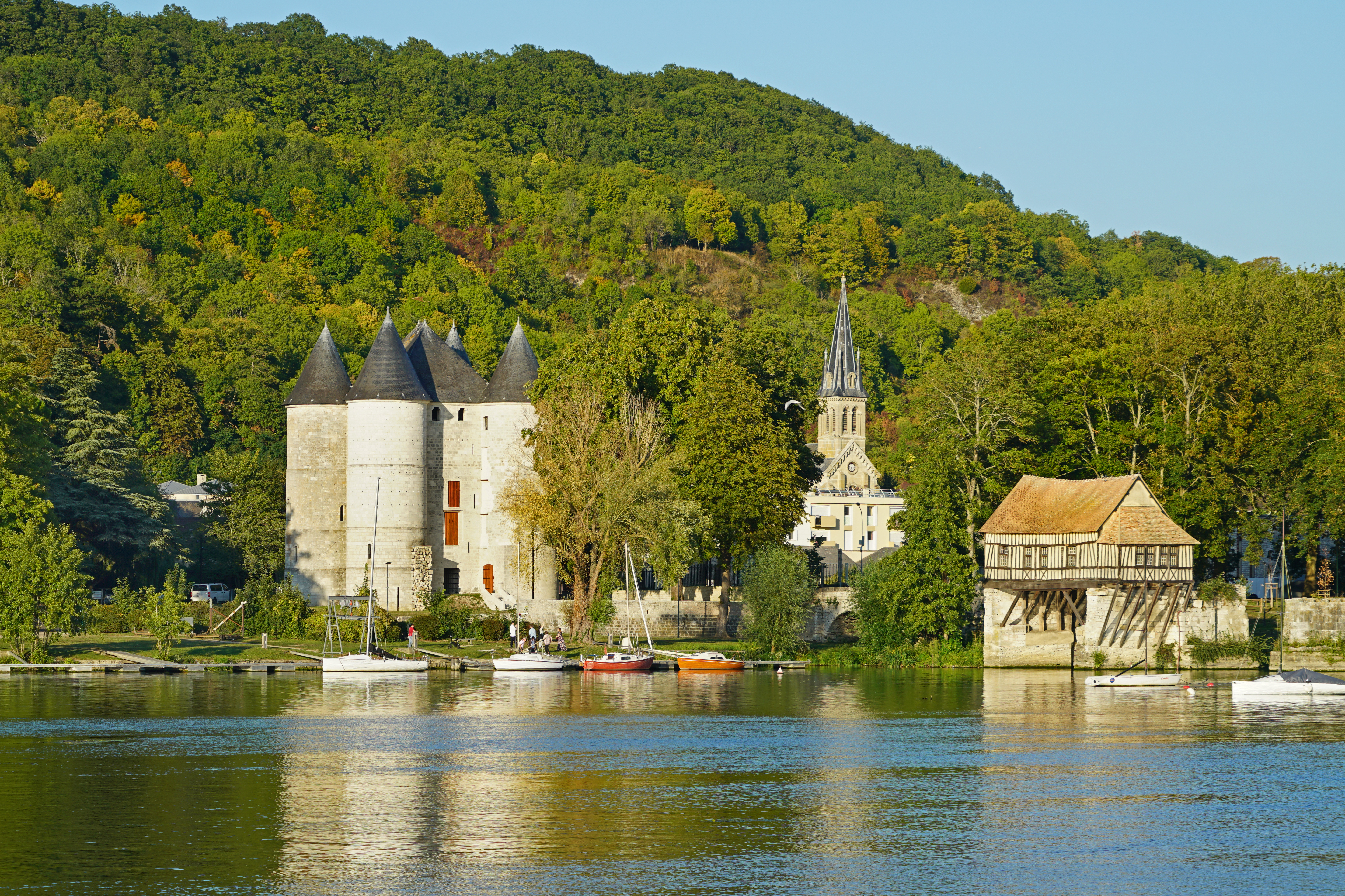 Le château des Tourelles est un édifice du XIIIème siècle, situé à Vernon sur la rive droite de la Seine. Sur la droite, le Vieux-Moulin est un ancien moulin à eau, construit au XVIème siècle sur les piles d'un pont médiéval du XIIème siècle. Le château sur Wikipedia Le Vieux-Moulin sur Wikipedia (Vernon)